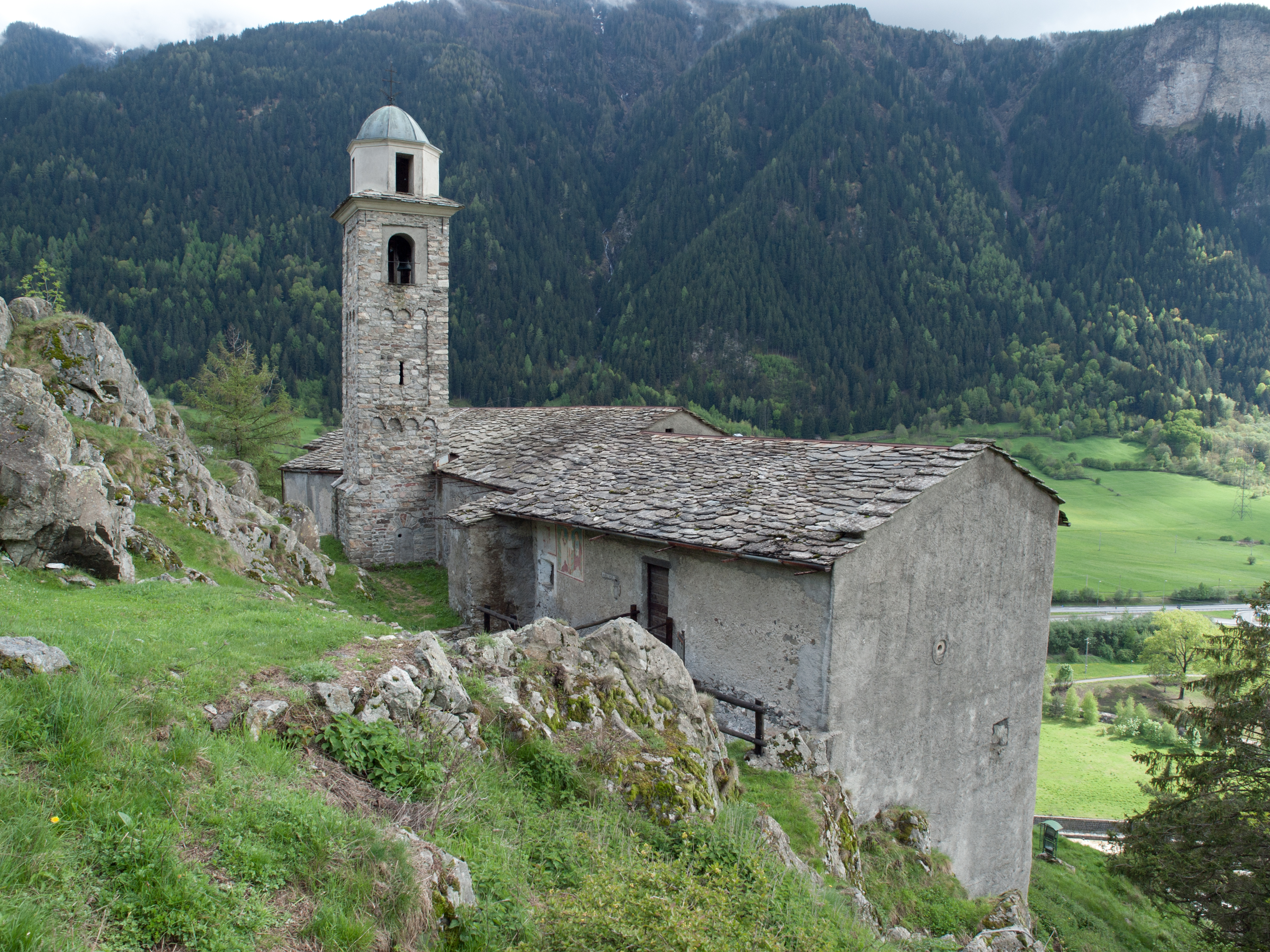 Chiesa di Sant'Agnese (XIII sec.) - Sondalo, Valtellina Italy